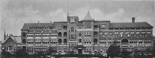 Diaconessenhuis